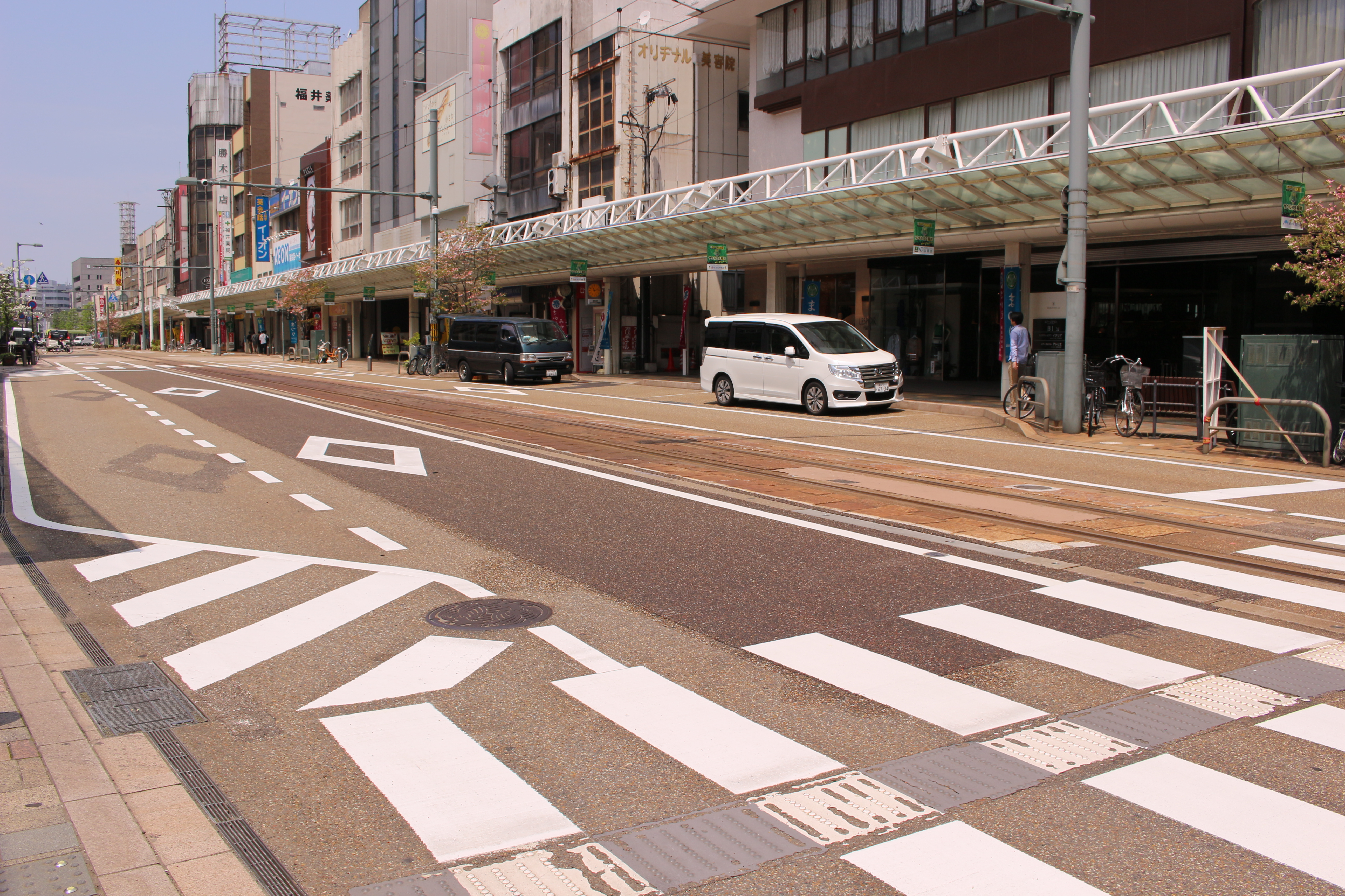 福井鉄道の福井駅の跡地